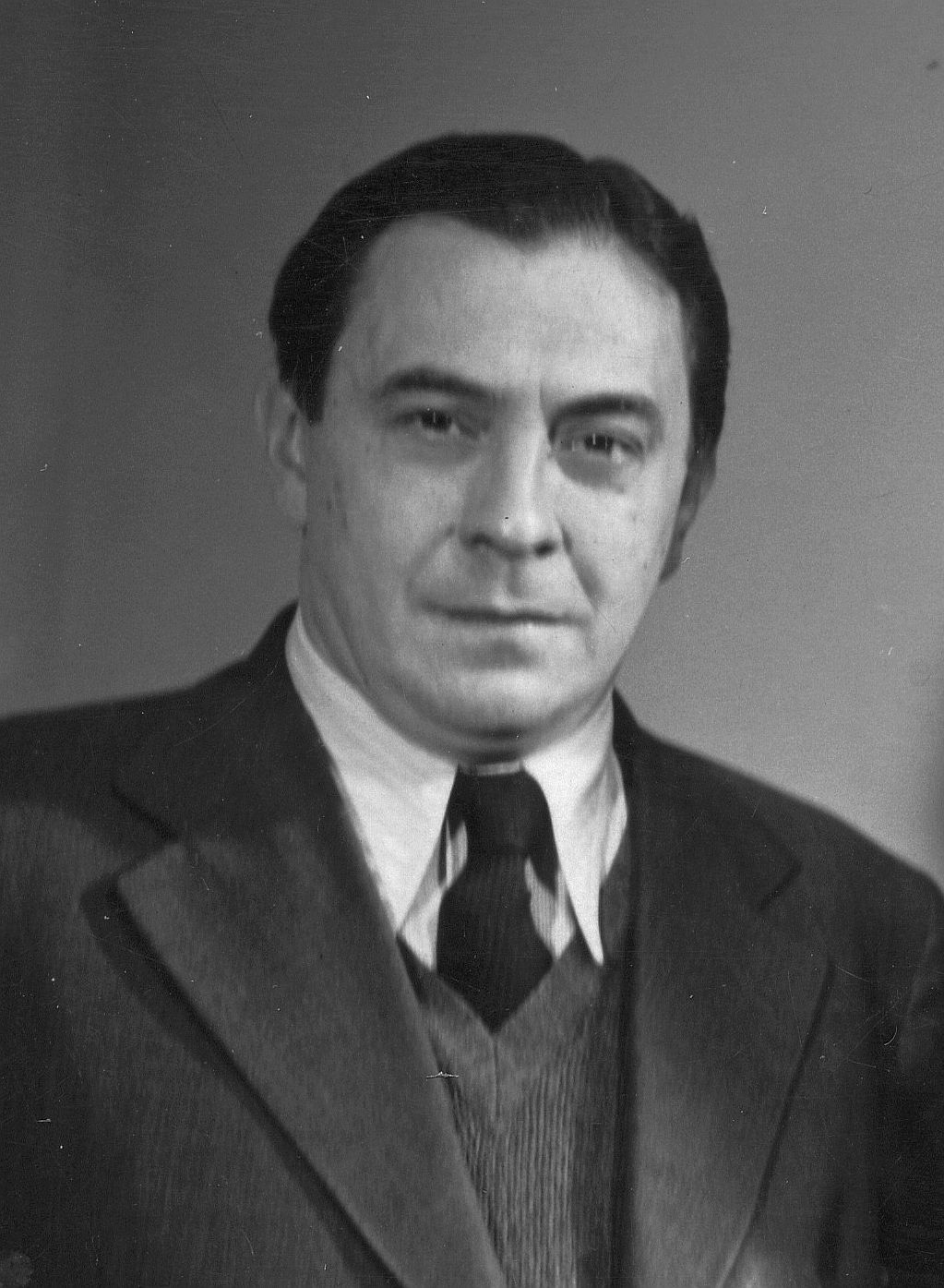 Bolváry Géza színész, filmrendező, forgatókönyvíró